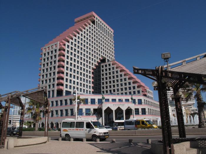 מגדל האופרה